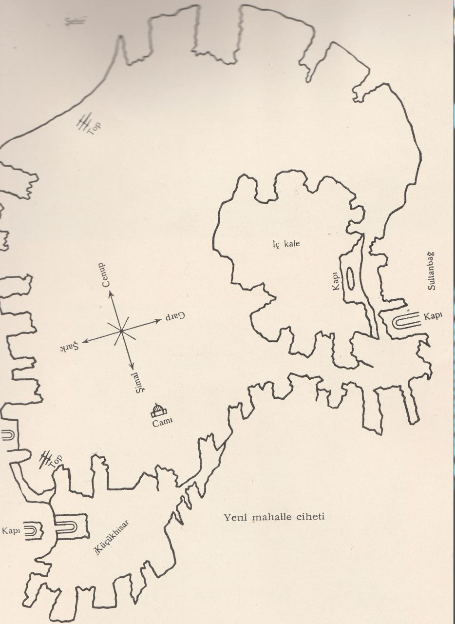 kütahya kalesi planı